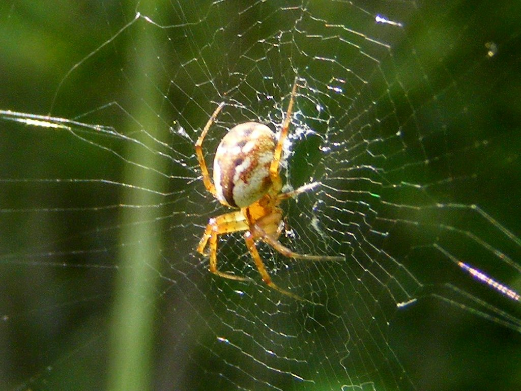 Mangora placida : Photographiés dans la région montréalaise les 7 juin et 7 juillet 2011, sur Fujifilm FinePix S700.